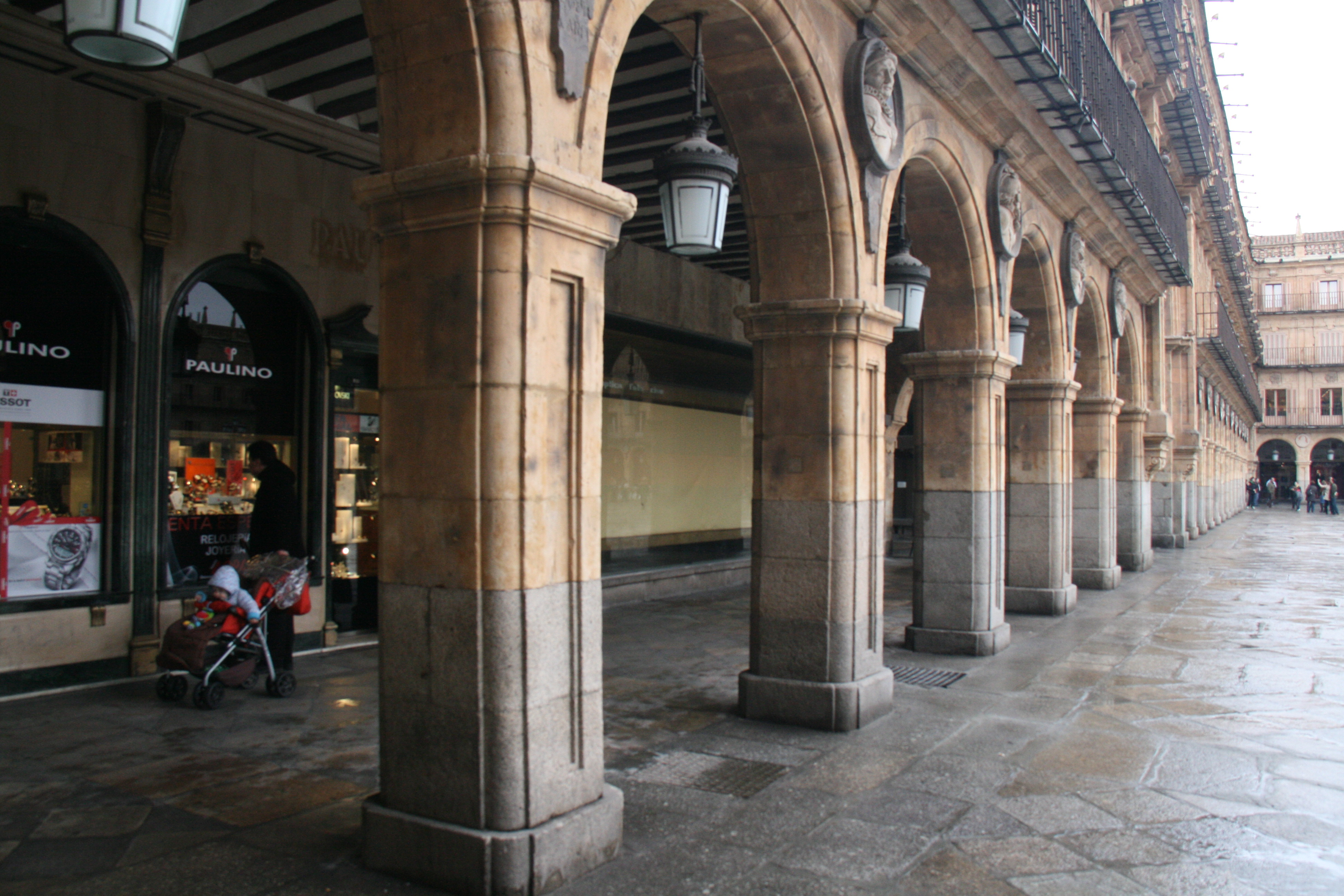 Machones de granito en la Plaza Mayor de Salamanca (Pabellón de San Martín)